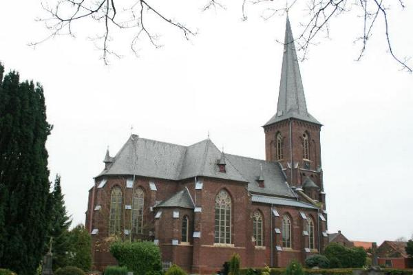 Kath. Pfarrkirche in Wegberg-Merbeck